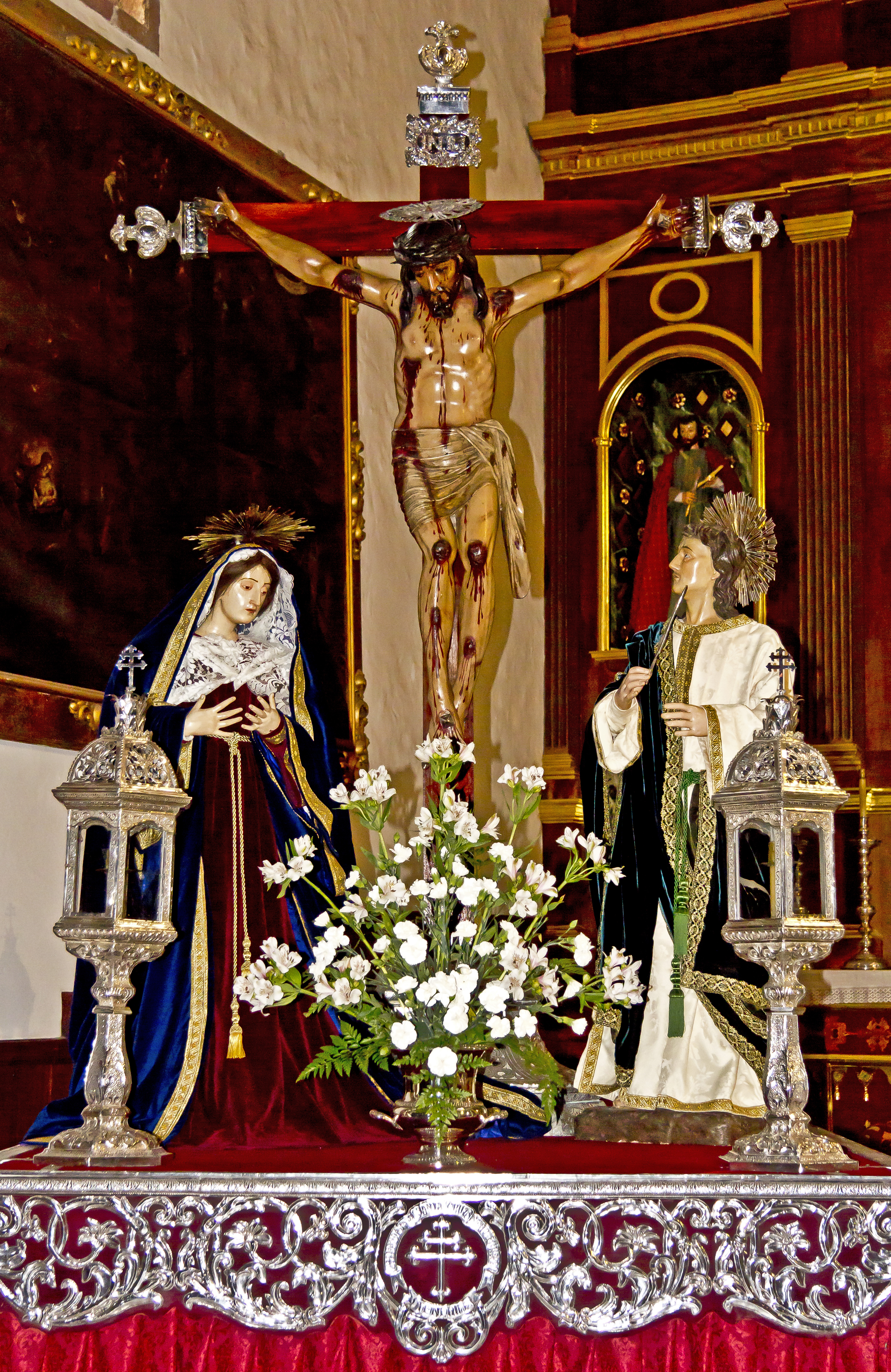 Die Kreuzigungsgruppe aus „Cristo del buen viaje“, „Virgen Dolorosa“ und „Juan evangelista“ befinden sich üblicherweise im Altar des linken inneren Seitenschiffs der Kirche Nuestra Señora de la Concepción in Santa Cruz de Tenerife. Die Figuren befindet sich hier auf der Transporteinrichtung für die Prozession.